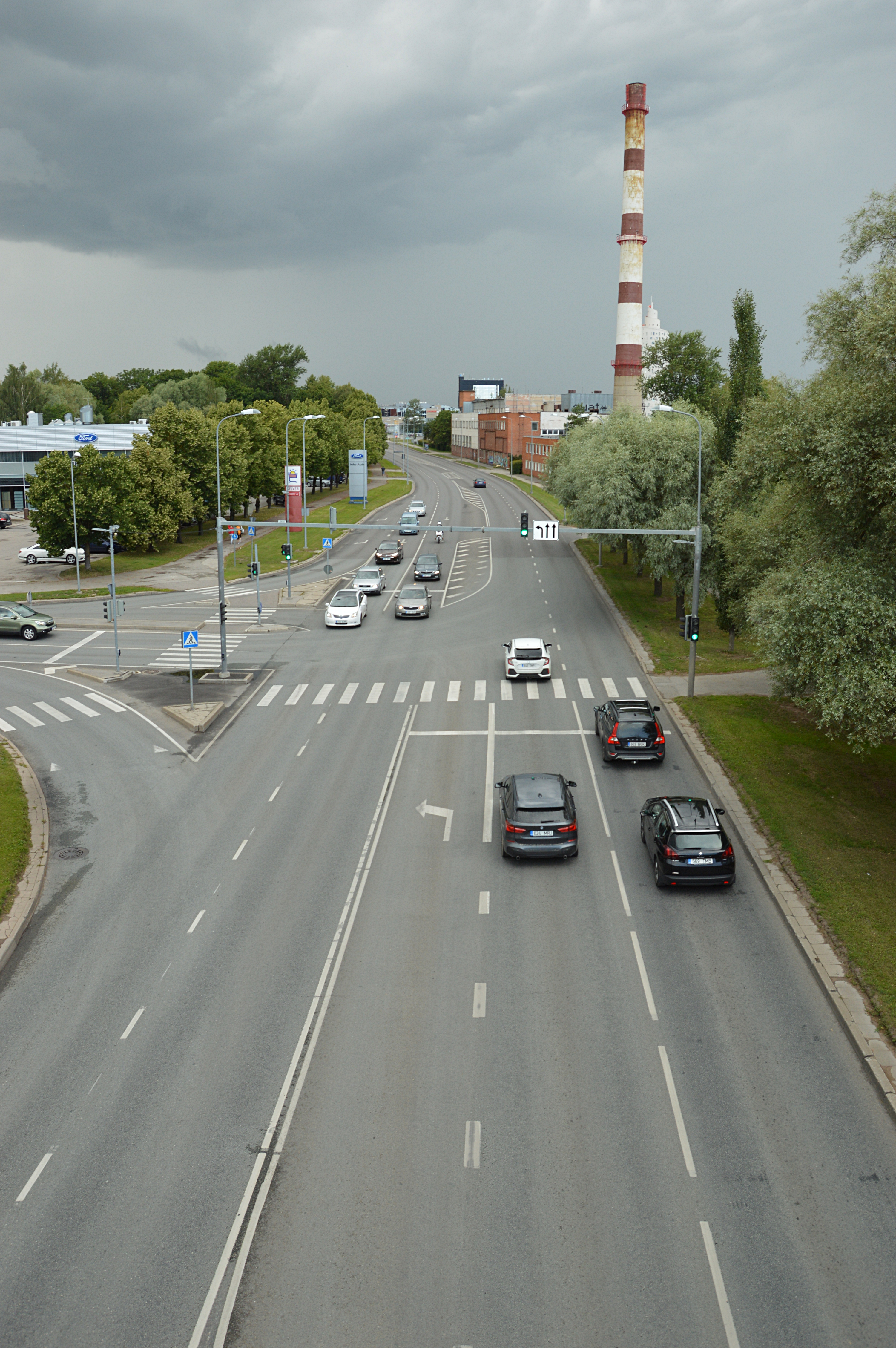 Turu tänav vaadatuna Sõpruse sillalt. Ees paremal paistavad ka Tartu keskkatlamaja hooned.